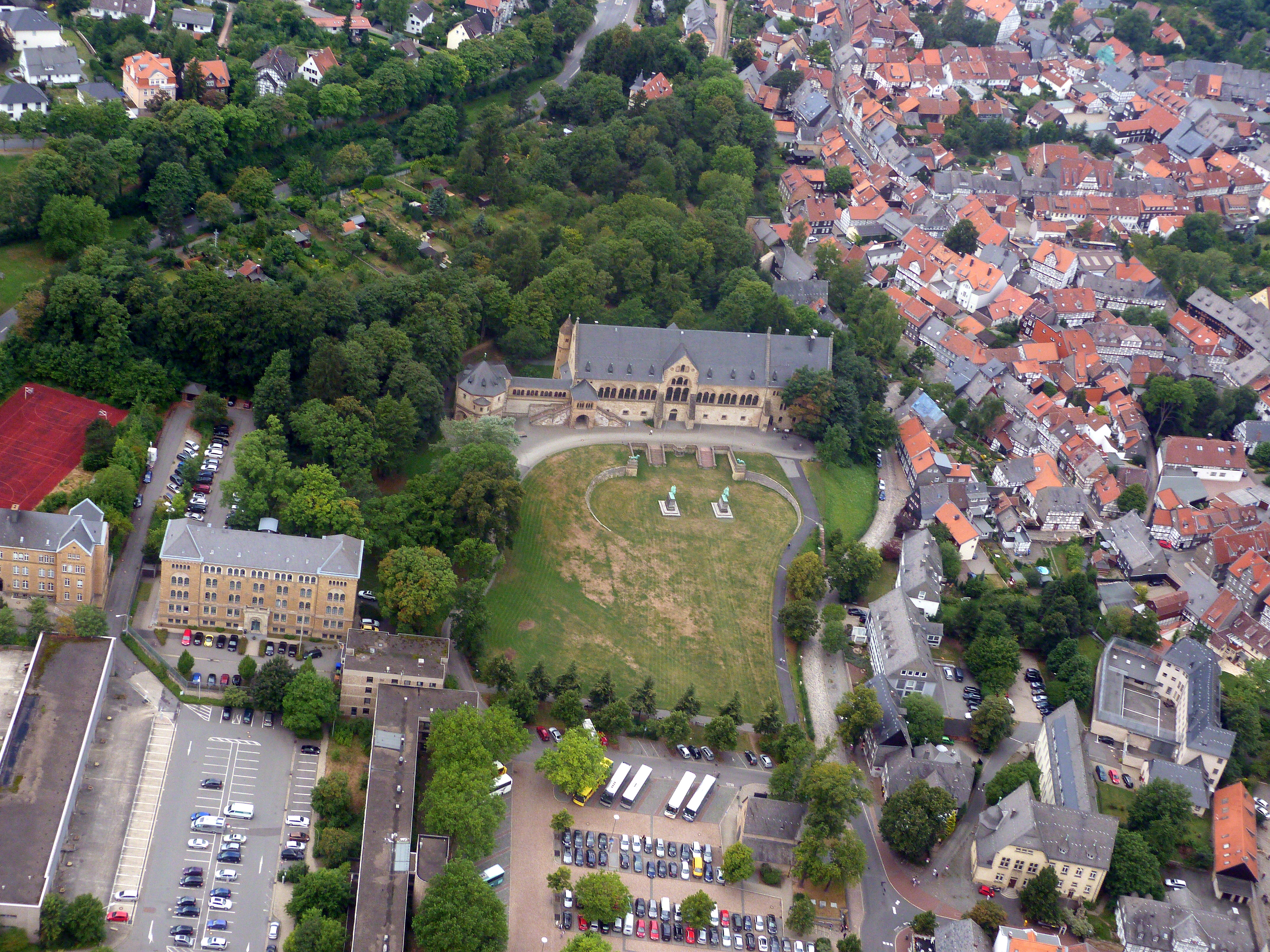 Kaiserpfalz aus dem Flugzeug gesehen